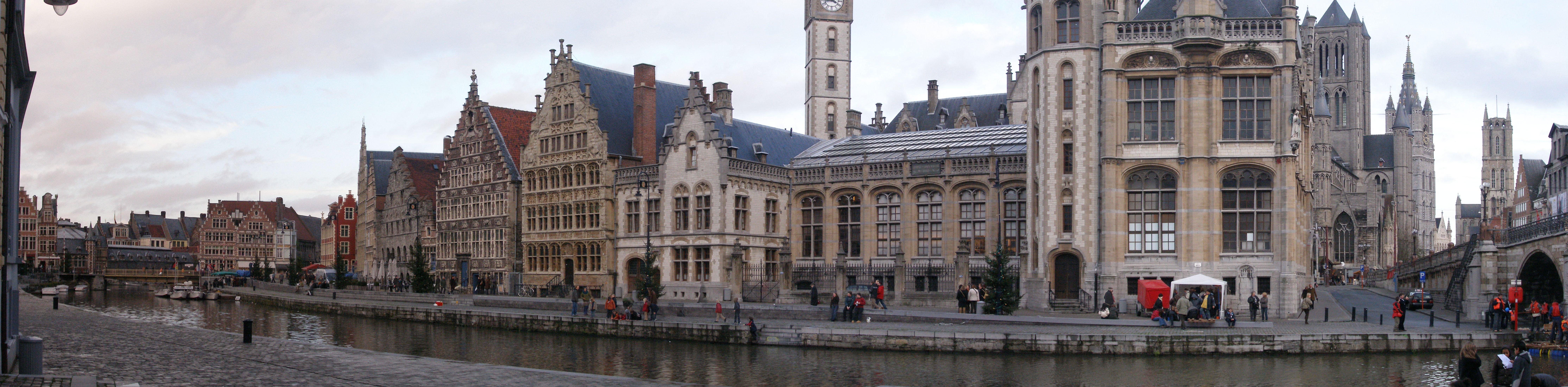 Graslei in Ghent, Belgium